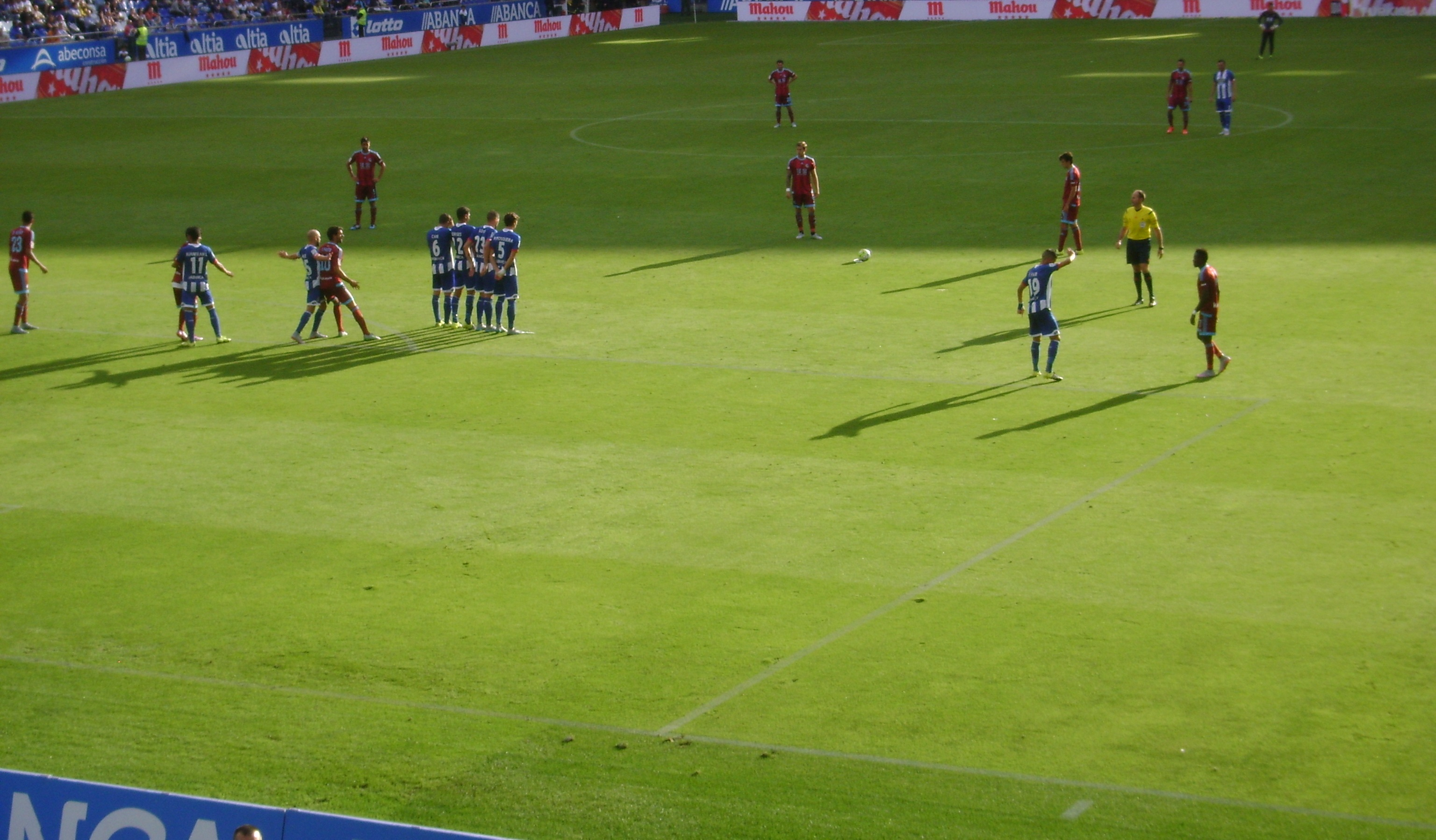 Deportivo de La Coruña vs. Real Sociedad